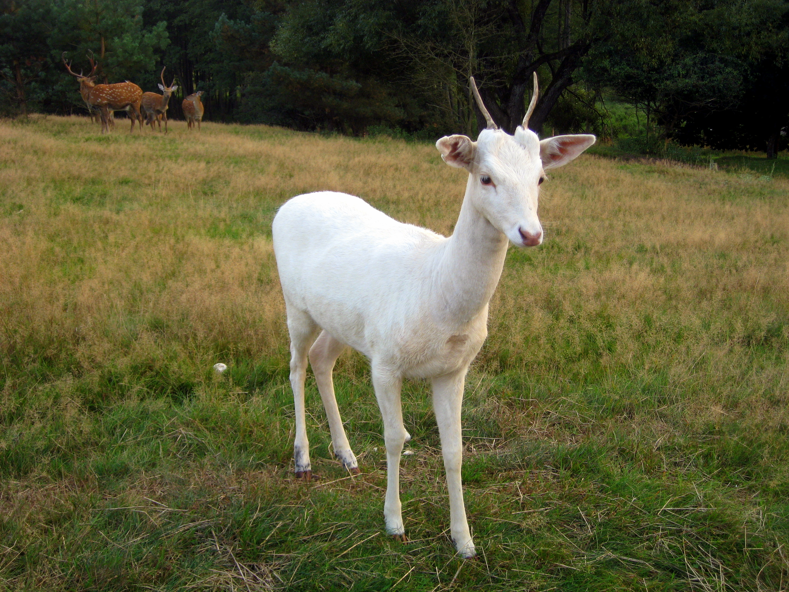 daniel